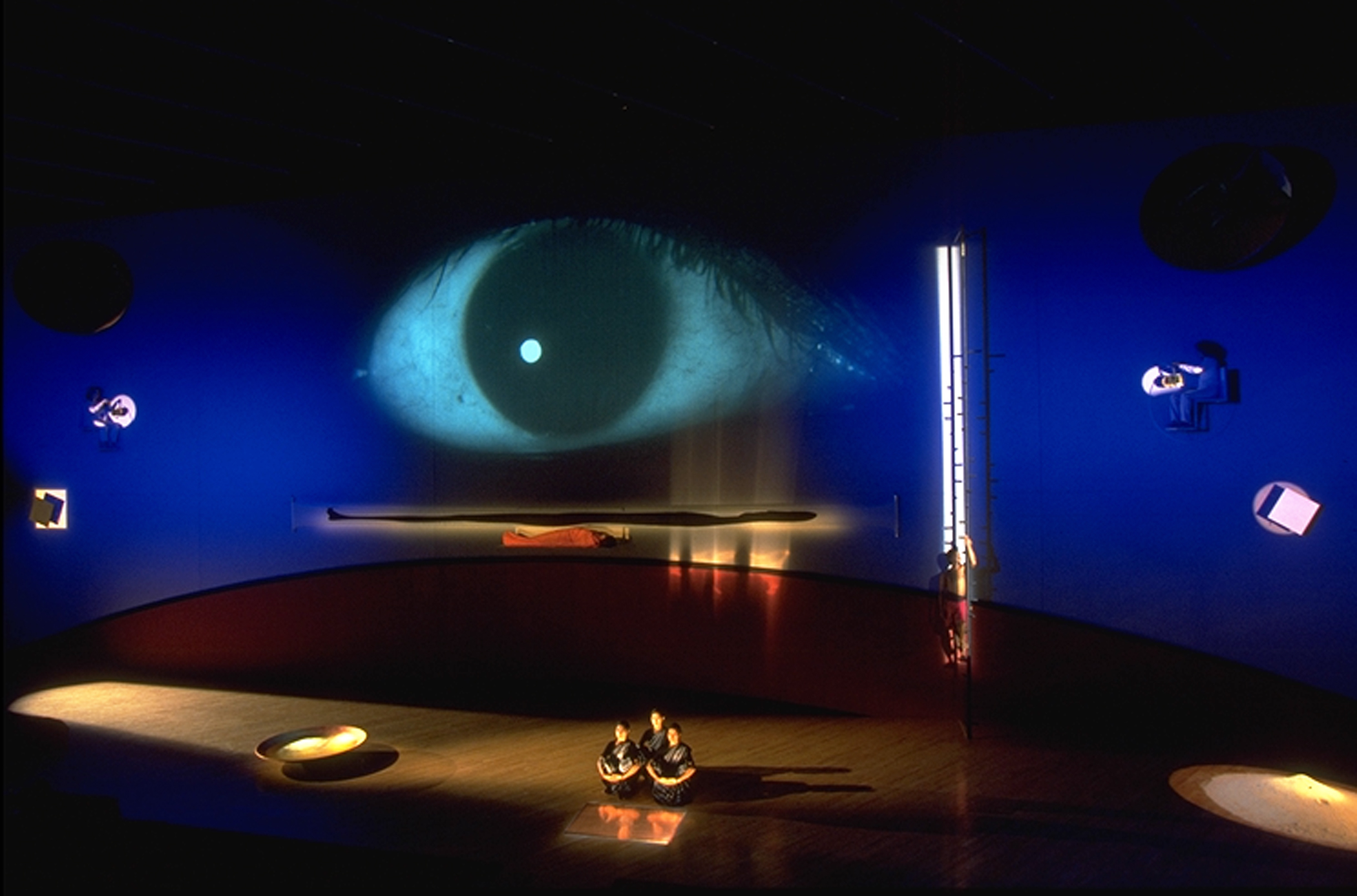 Interim, 1995 (Kristin Jones, Andrew Ginzel)